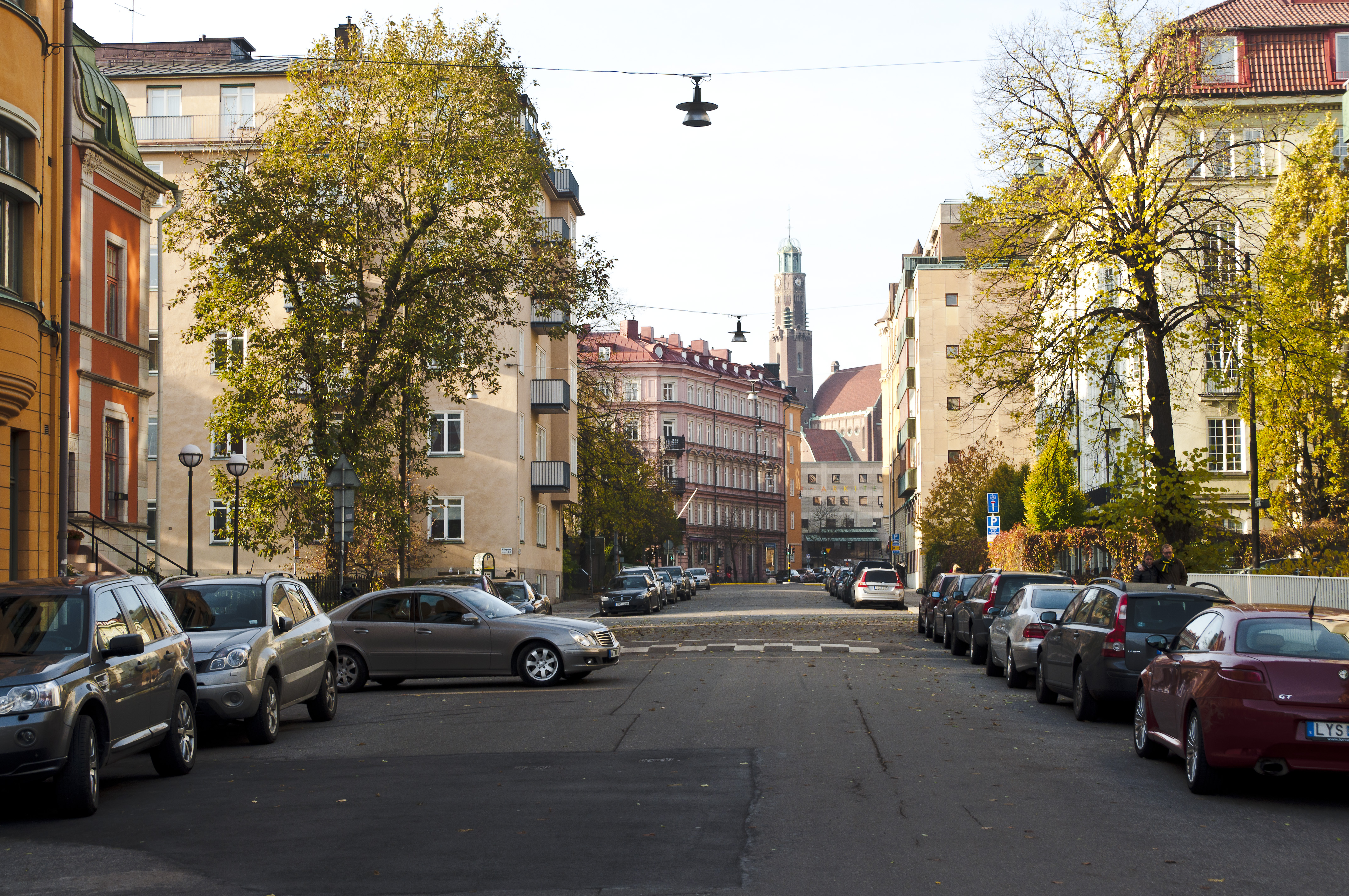 Östermalmsgatan västerut i höjd med Villagatan. I fonden Engelbrektskyrkan & Arkitekturskolan